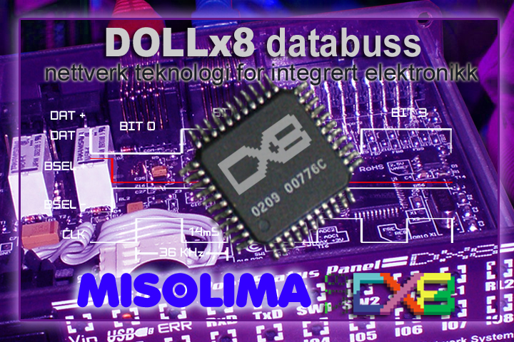 DOLLx8 Nettverk